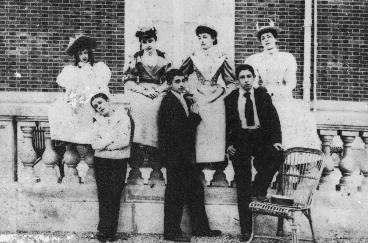 Los hijos de Justo Rufino Barrios y Francisca Aparicio Auyón